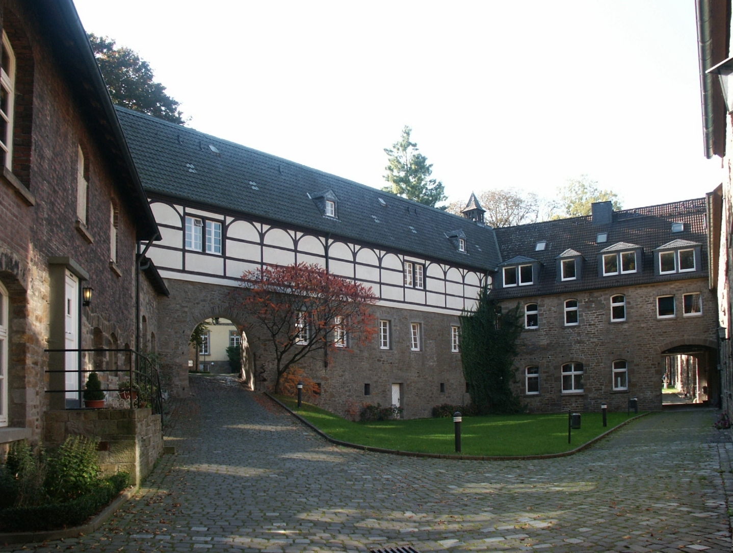 Description: Schloss Schellenberg - Renteigebäude Capture date: 13. Oct. 2005 Photographer: Sir Gawain